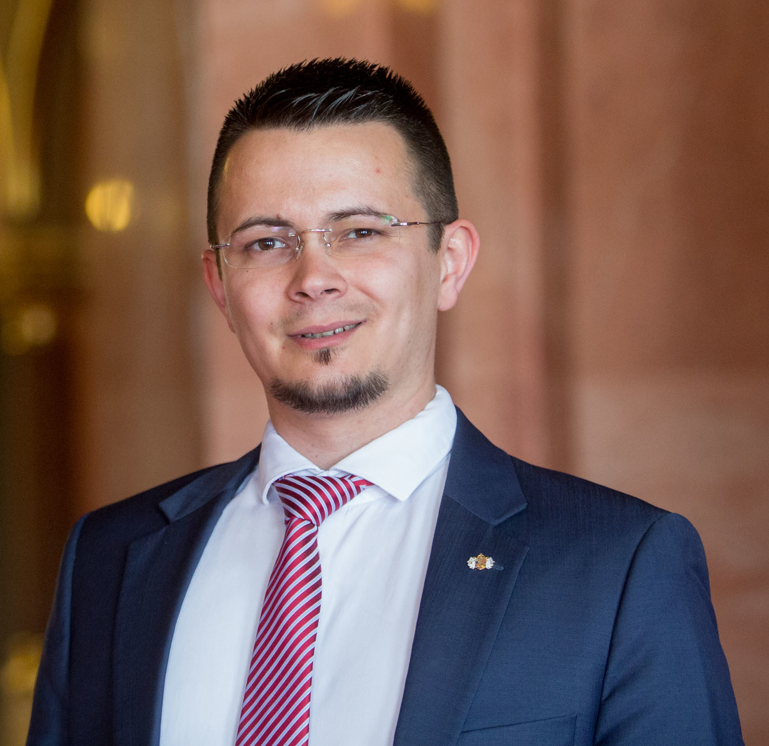 Janiczak Dávid (Ózd, 1987. március 4. –) magyar–lengyel származású politikus, 2014-óta Ózd polgármestere (egyben Magyarország egyik legfiatalabb polgármestere), 2016-tól a Jobbik alelnöke.